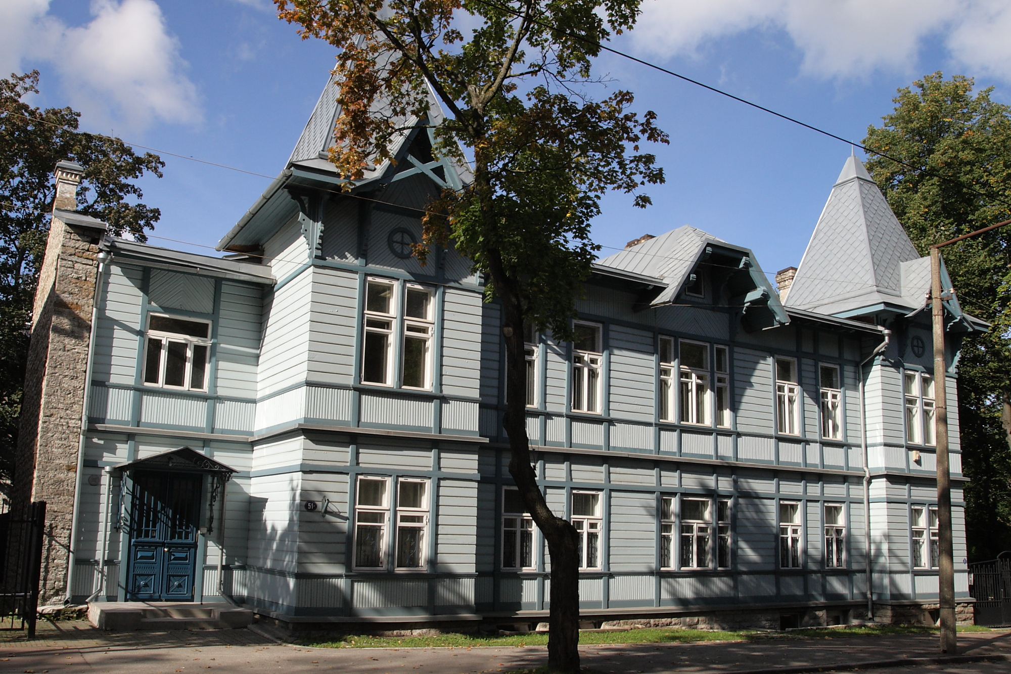 Tallinn, elamu, 1906 ja kus 1920.-30. aastatel elas Jüri Jaakson